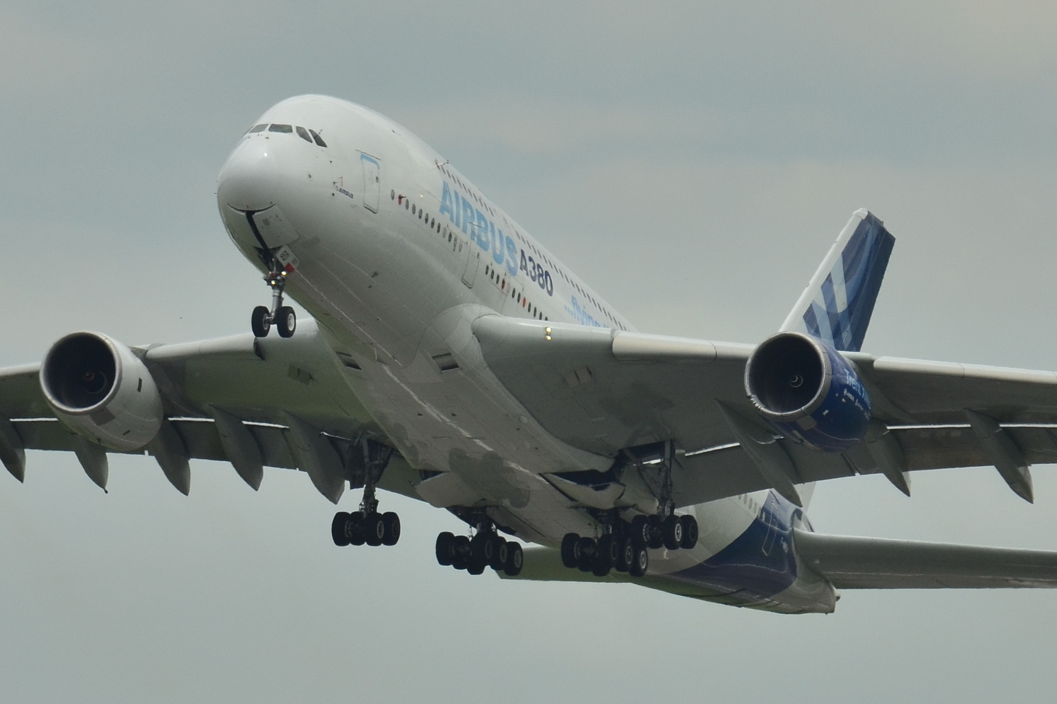 Photo prise à l'aéroport de Toulouse-Blagnac (LFBO) en France. Picture take at Toulouse-Blagnac Airport (LFBO) in France.